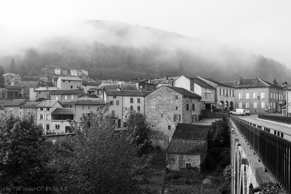 Centre du village en 2007.